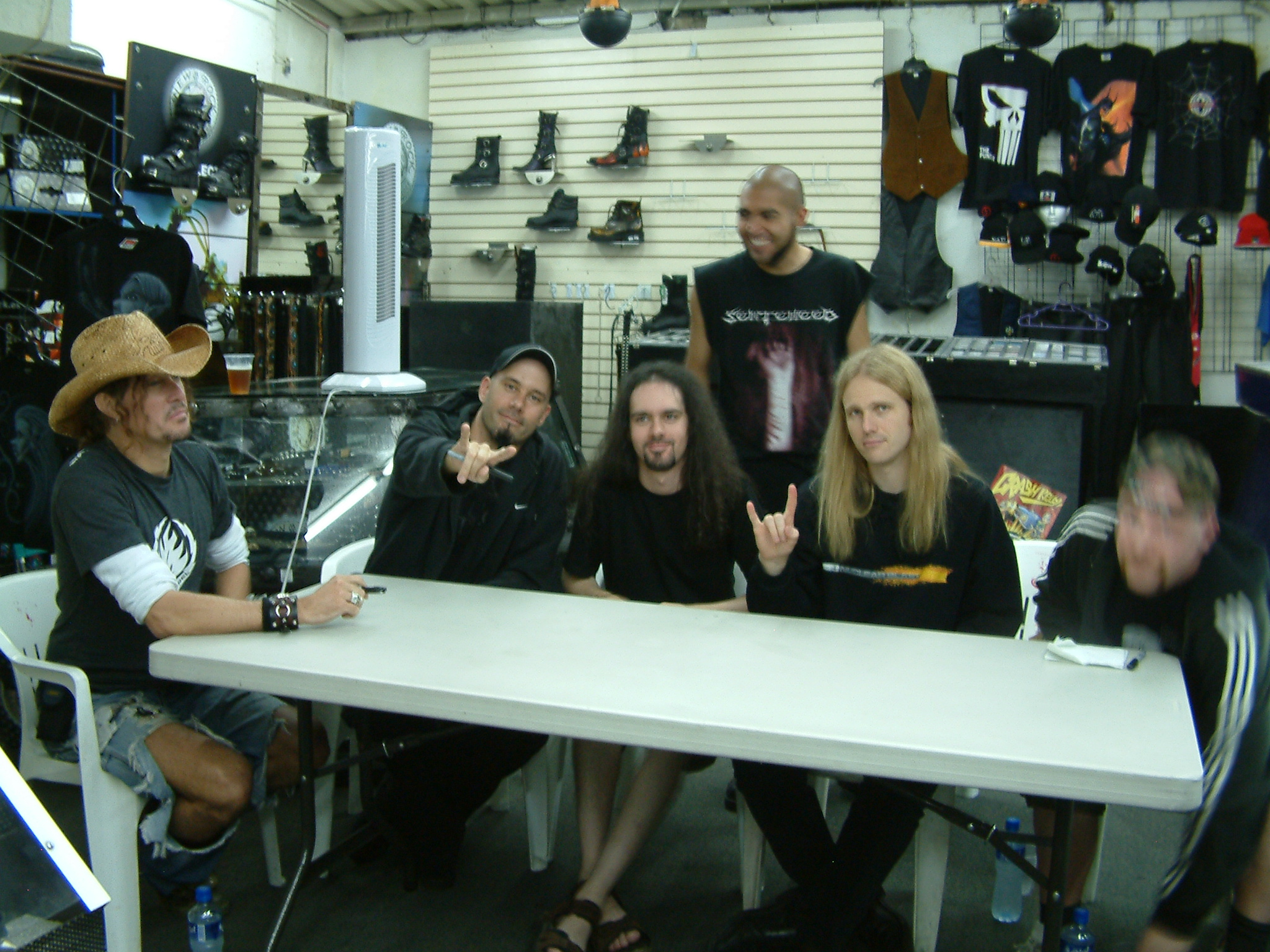 Firma de autografos de Therion.